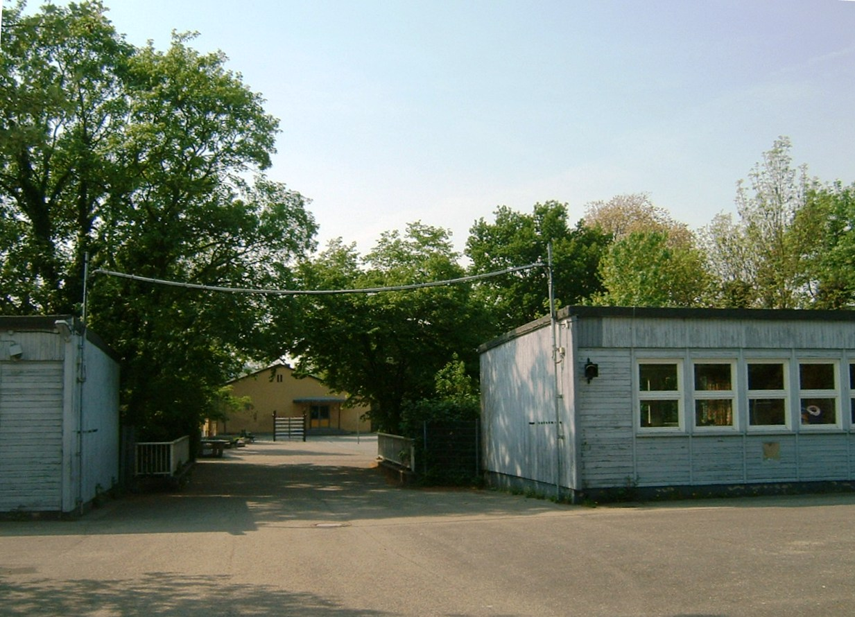 Goldsteinschule; Grundschule mit Förderstufe in Frankfurt am Main Ortsteil Goldstein, erbaut 1952; hier:Baracken und Nebengebäude